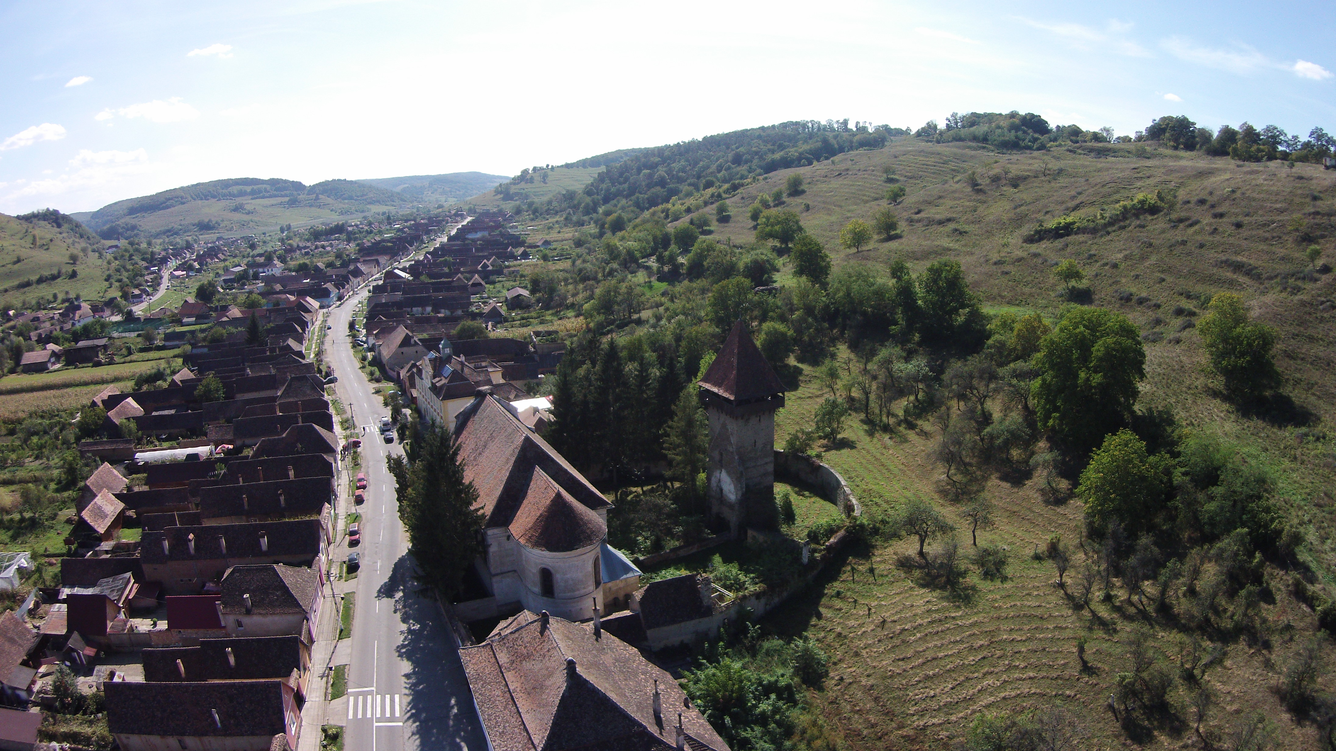 Ansamblul bisericii evanghelice